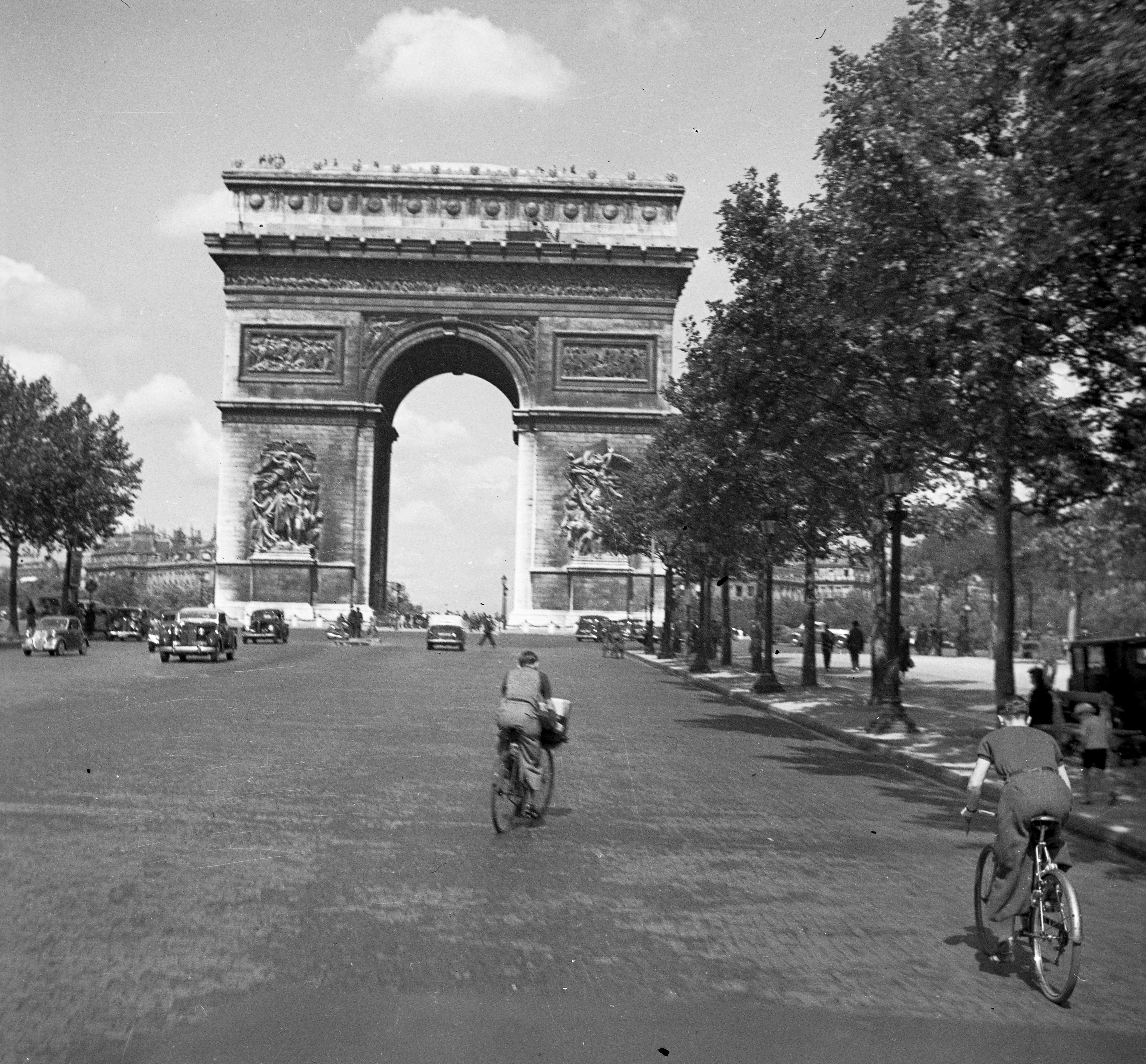 a Diadalív a Champs Élysées-ről nézve.